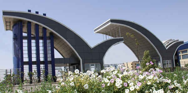 سردر ورودی دانشگاه